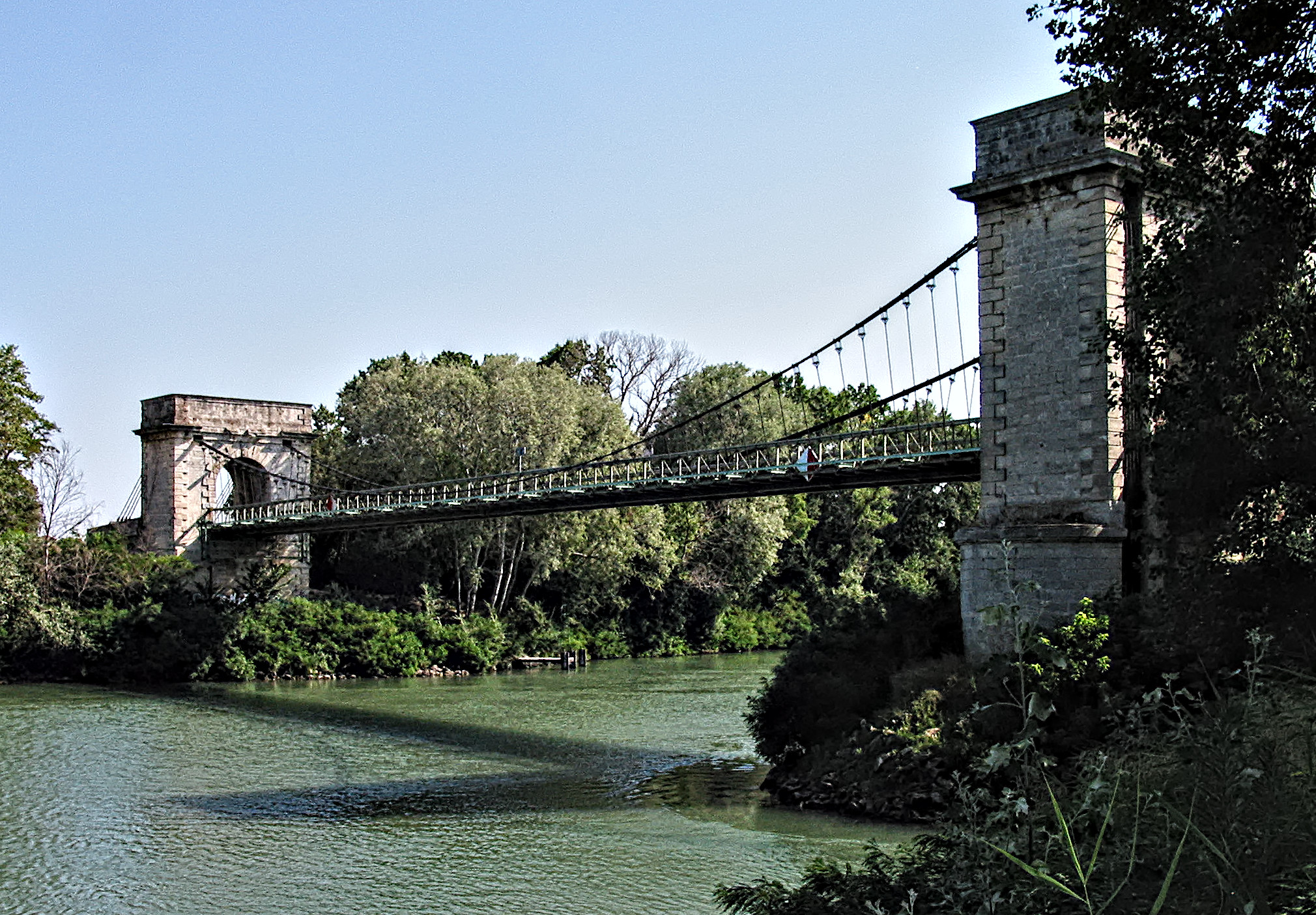 Petit Rhône near Arles with historique suspension bridge (Arles-Trinquetaille - Fourques)